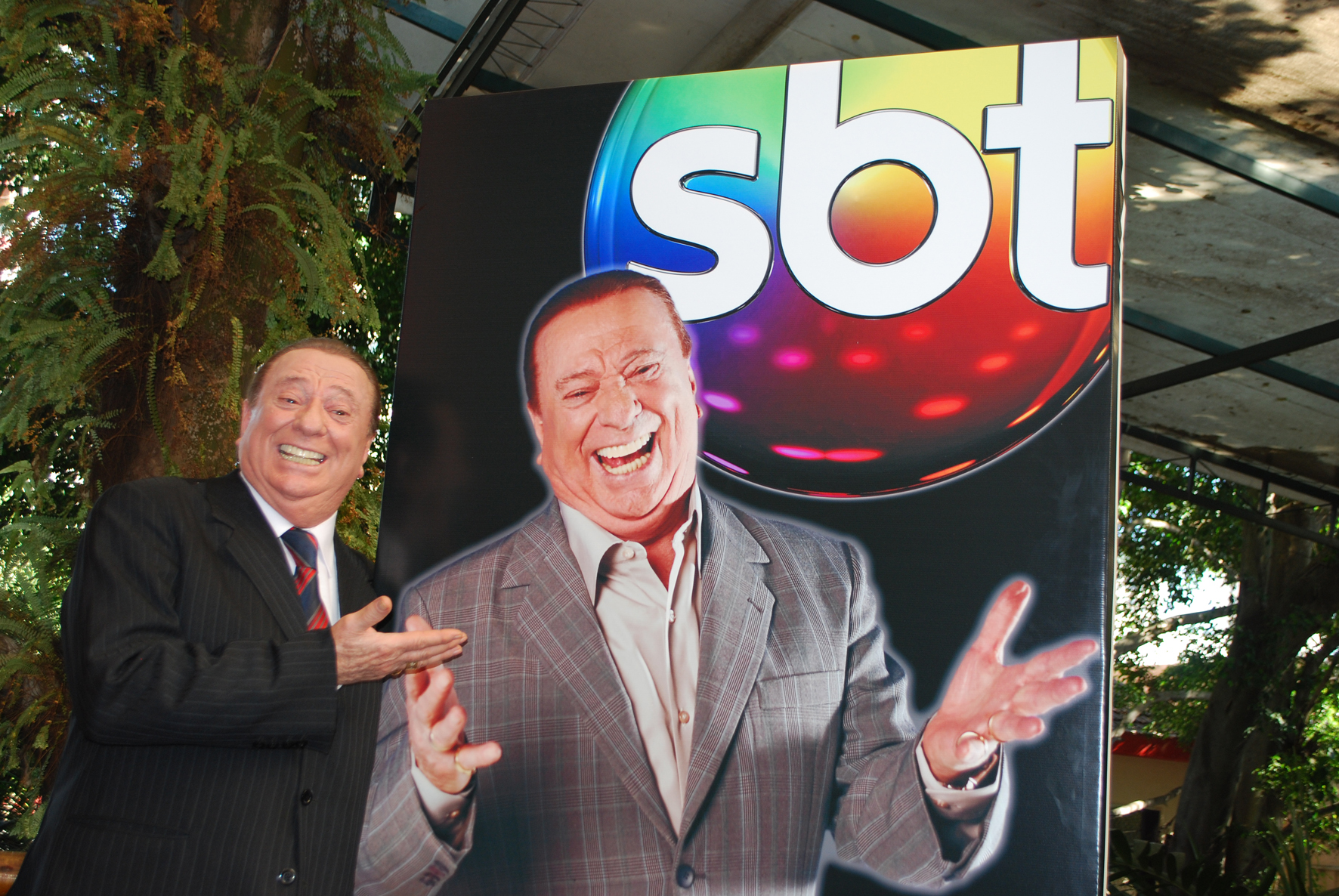 Raul Gil, o apresentador, na coletiva do seu novo programa no SBT!